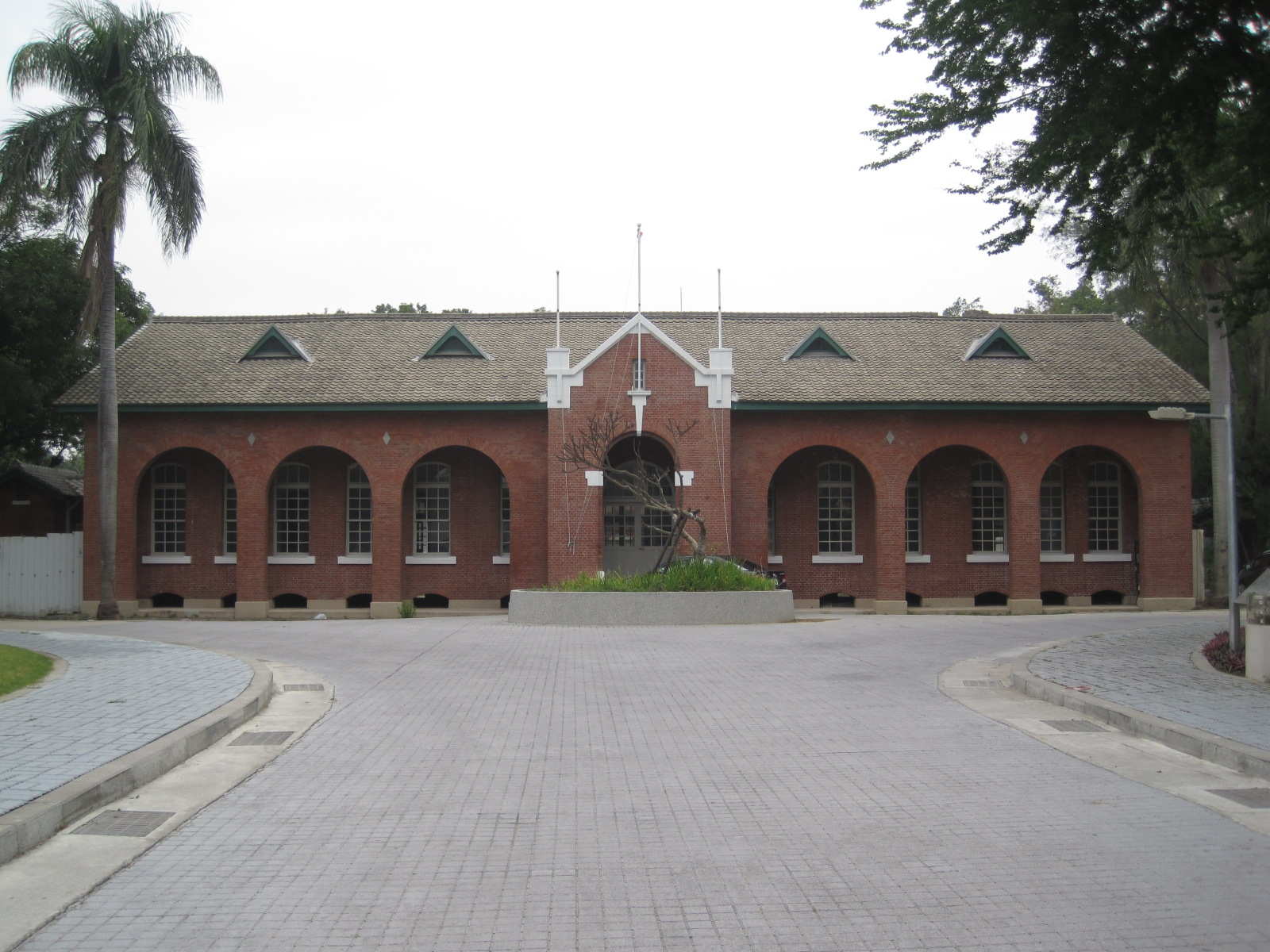 中文（台灣）: 2012年1月初的原日軍臺南衛戍病院。